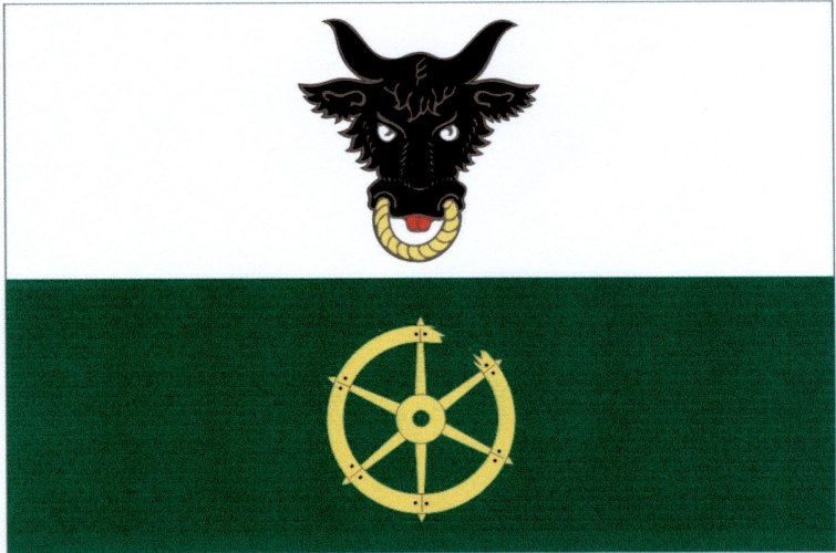 vlajka, Ubušínek, okres Žďár nad Sázavou